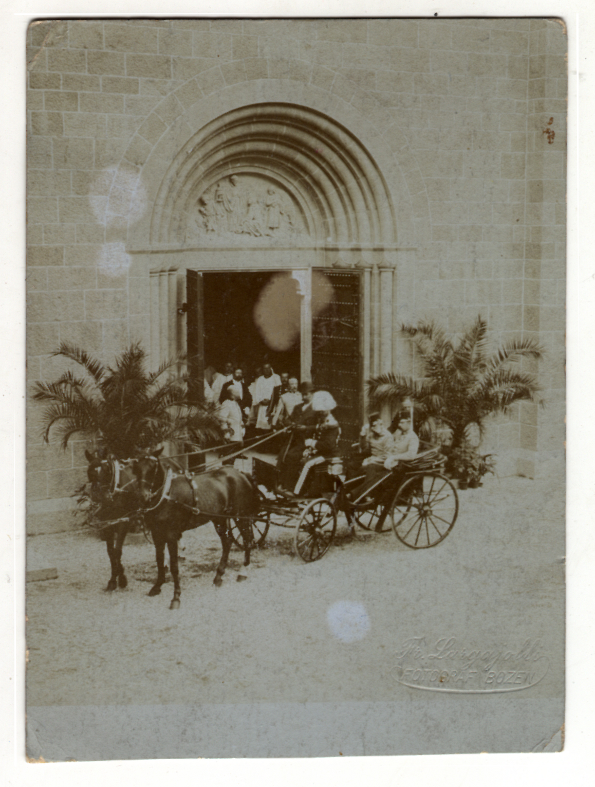 Einweihung der Herz-Jesu-Kirche in Bozen, Kaiser Franz Joseph und Erzherzog Franz Ferdinand fahren in der Kutsche vor.